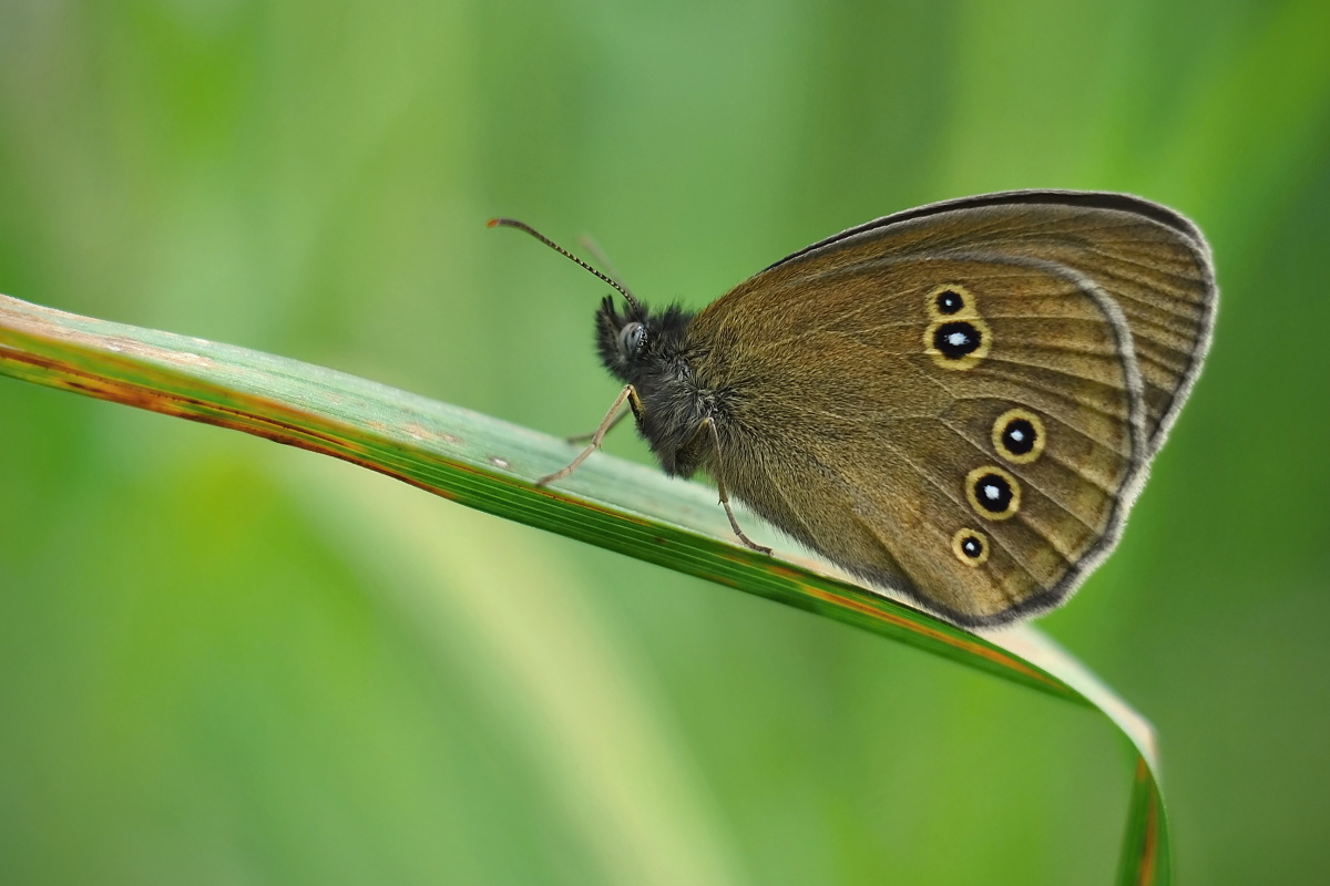 Okáč prosíčkový, Toužimsko 2014